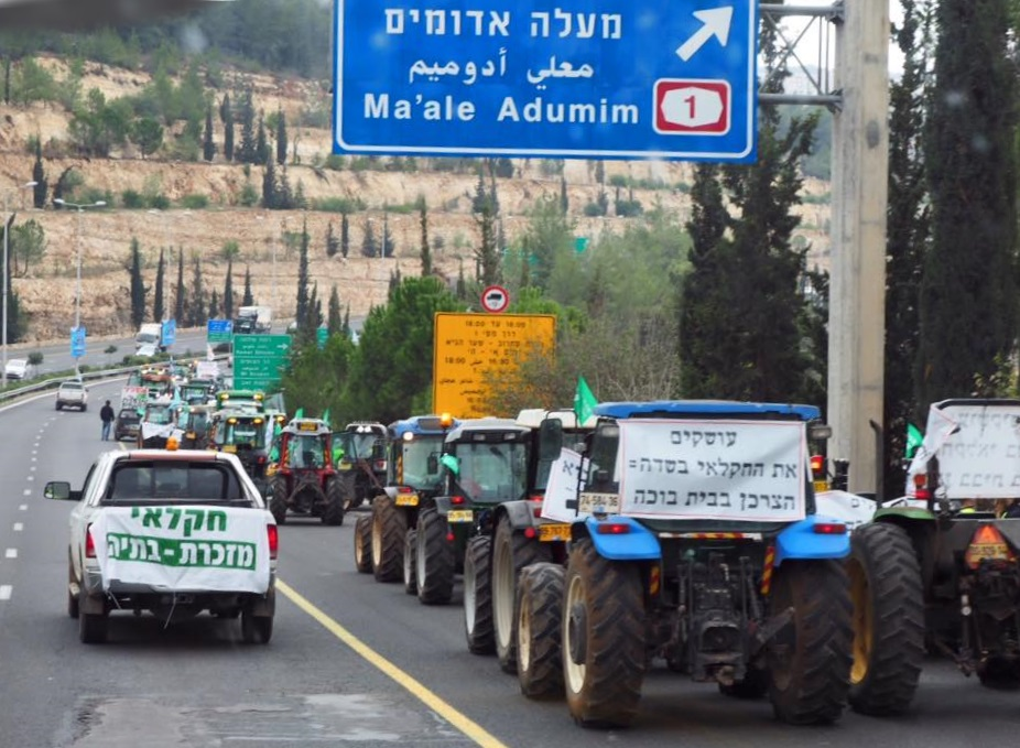 שיירת הטרקטורים בדרך לירושלים